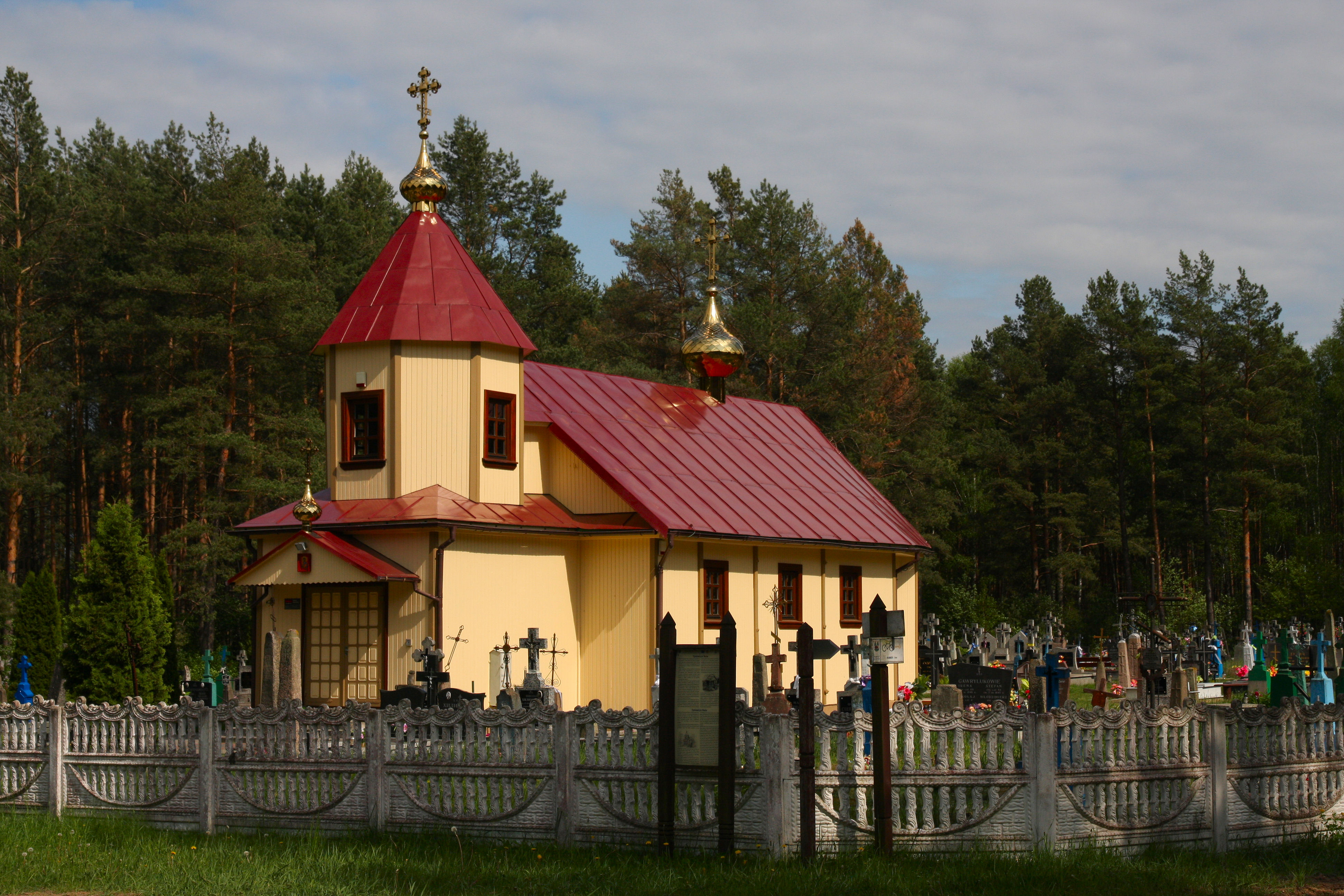 Tyniewicze Duże, Poland